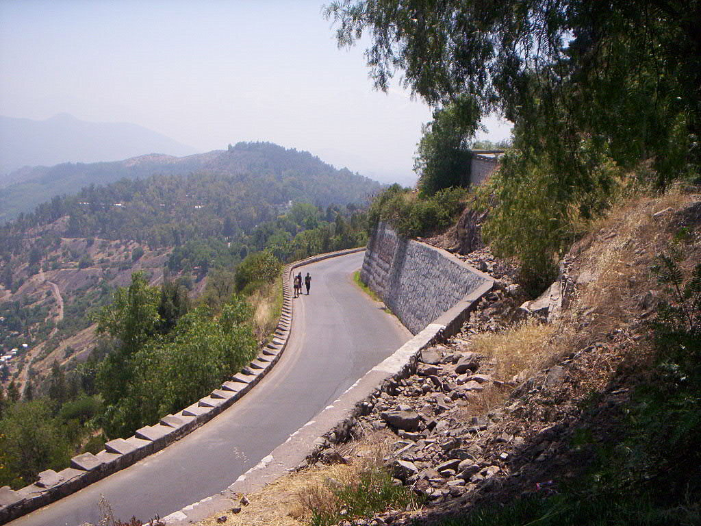 (tomada por otra...) cerro San Cristóbal en Santiago